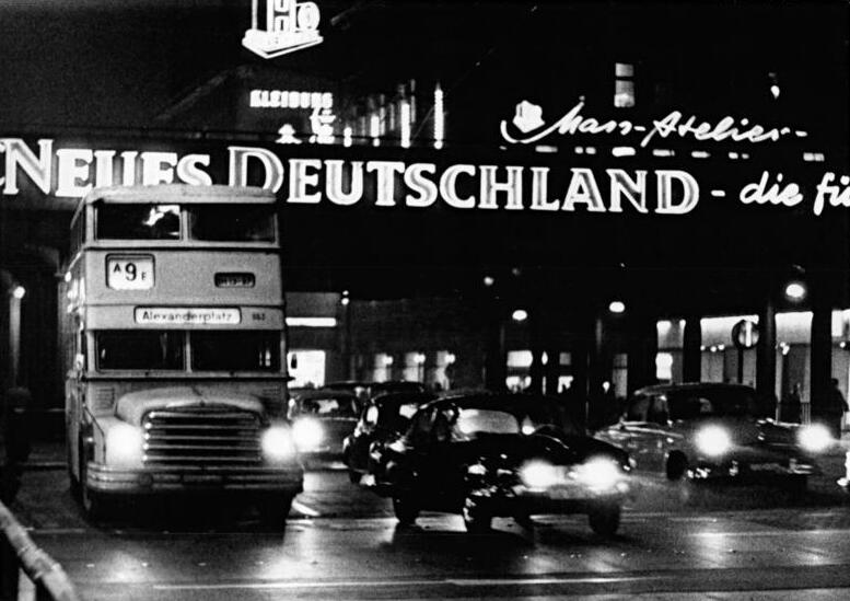 Berlin, Alexanderplatz, Omnibus, PKWs, Nacht Zentralbild Kulka 19.12.64 Am Alexanderplatz in Berlin. Vielleicht hat die Hast der vorweihnachtlichen Zeit auch die Autofahrer ergriffen.